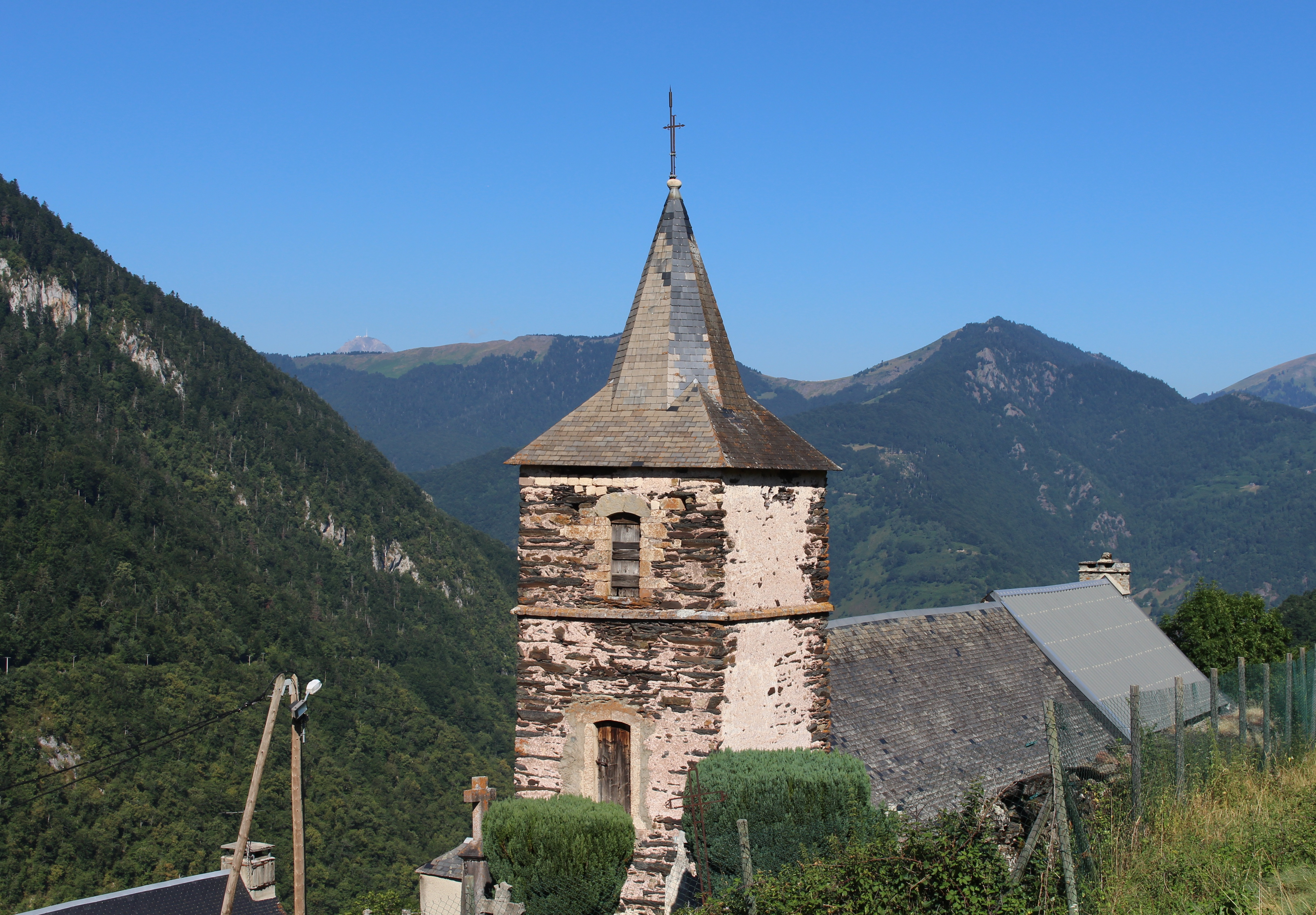 Église Saint-Pierre-aux-Liens d'Ardengost (Hautes-Pyrénées)